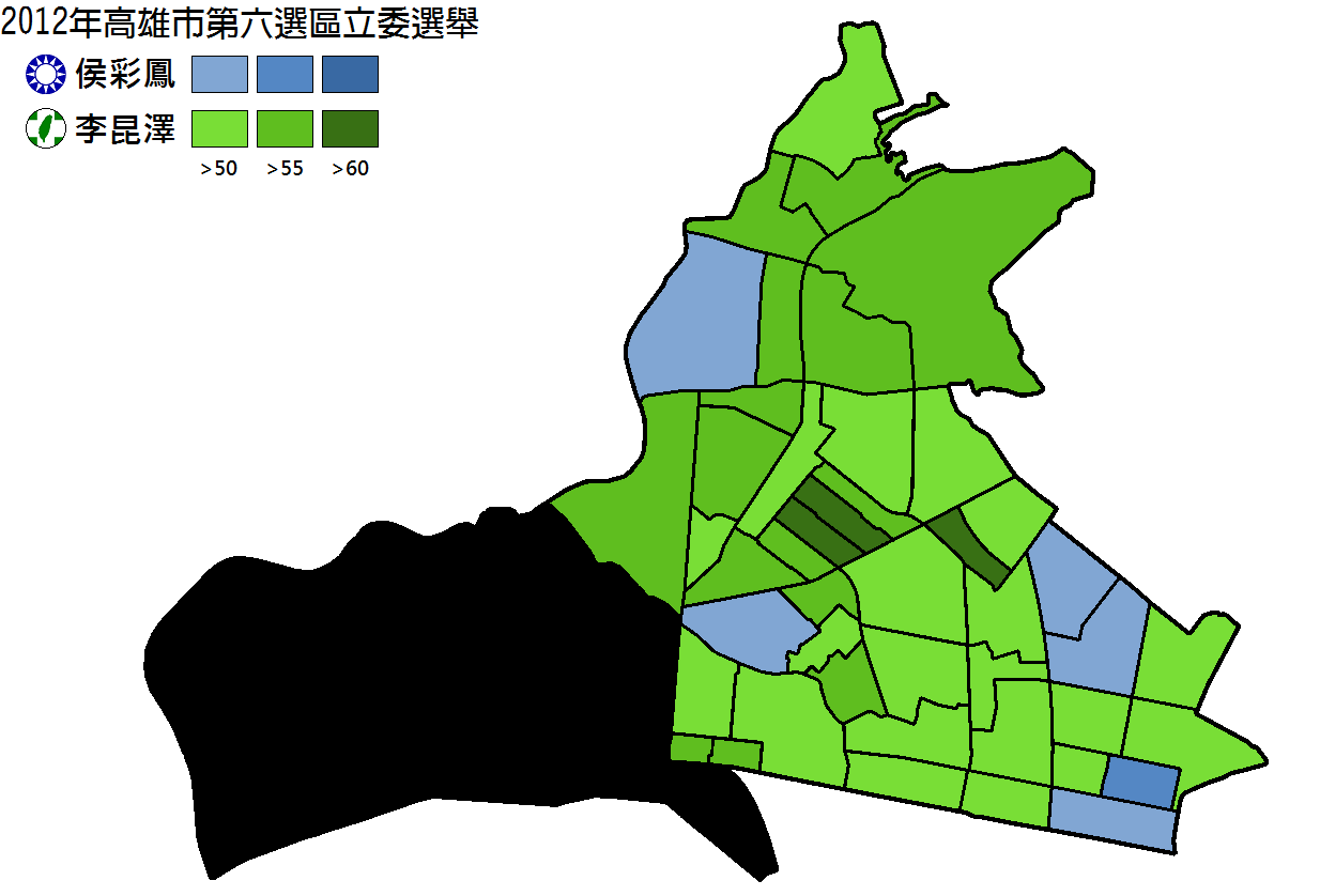 2012年高雄市第六選區立委選舉得票